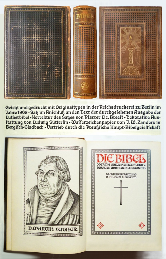 Altarbibel. Ledereinband, Frontispiz (Portrait Martin Luther) und Titelblattgestaltung von Ludwig Sütterlin